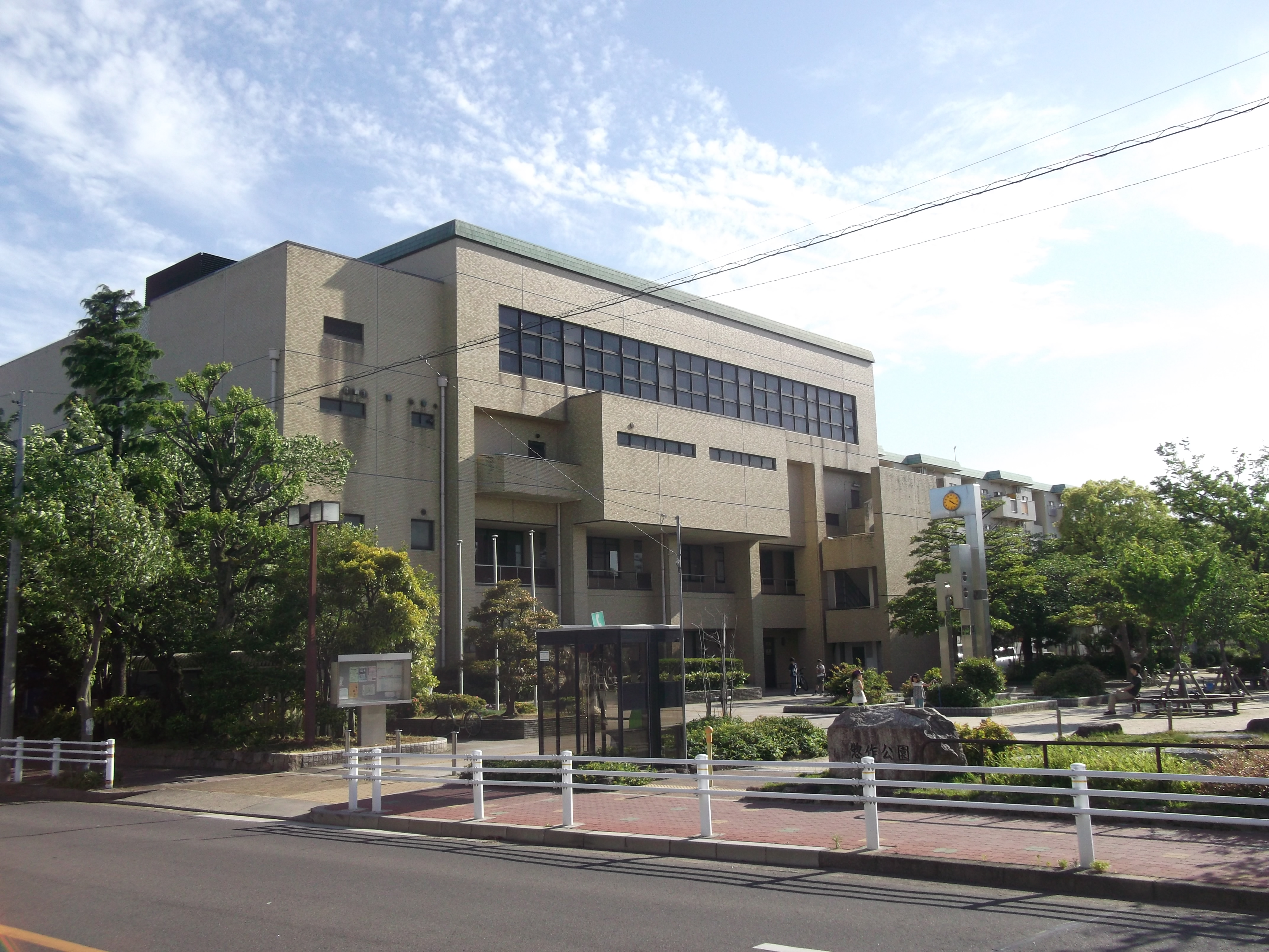 名古屋市瑞穂区惣作町の名古屋市瑞穂生涯学習センターを東側公道北側から写す